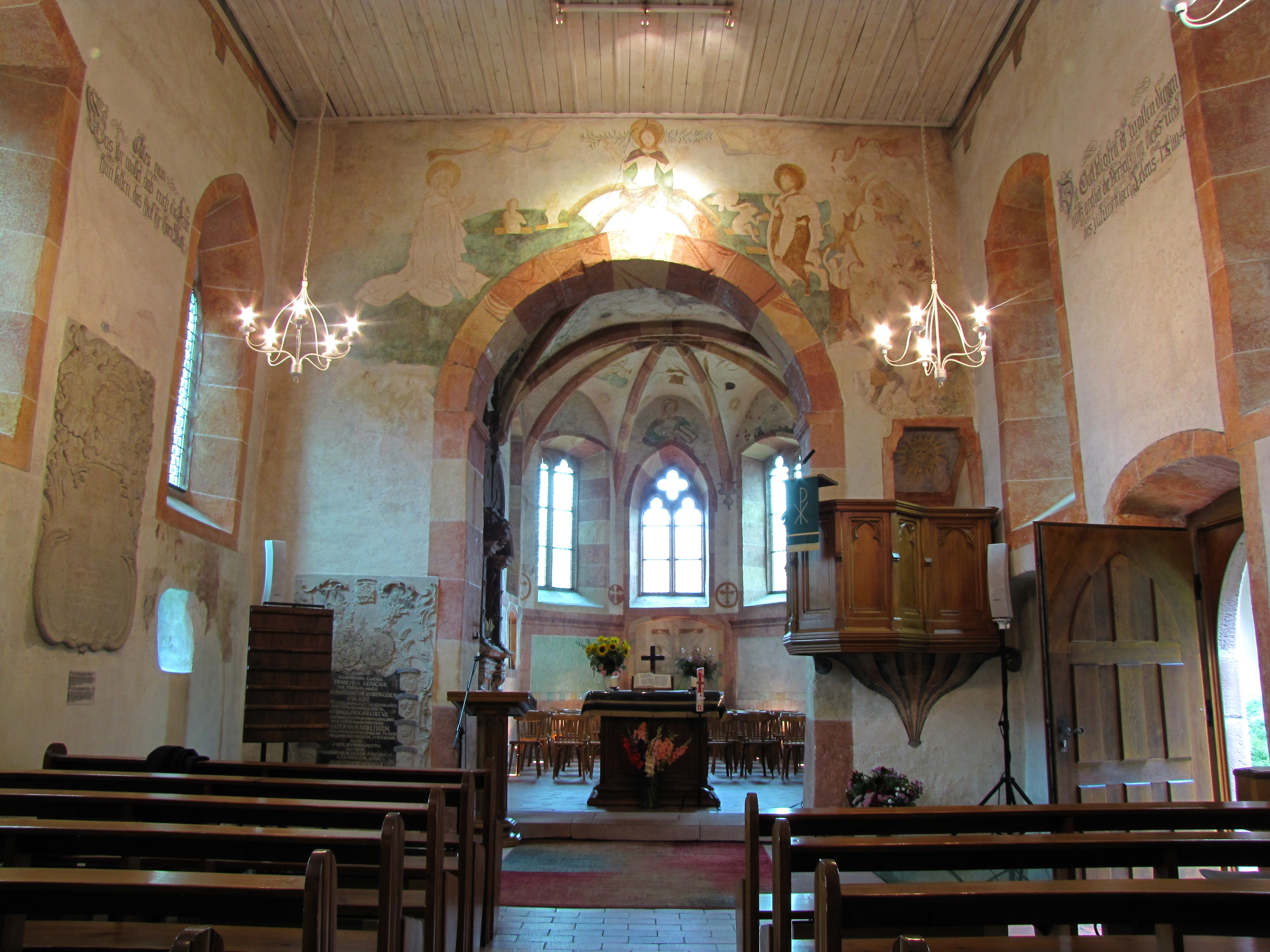 Alsace, Bas-Rhin, Baldenheim, Église protestante (PA00084595, IA67010725). Vue intérieure de la nef vers le chœur.